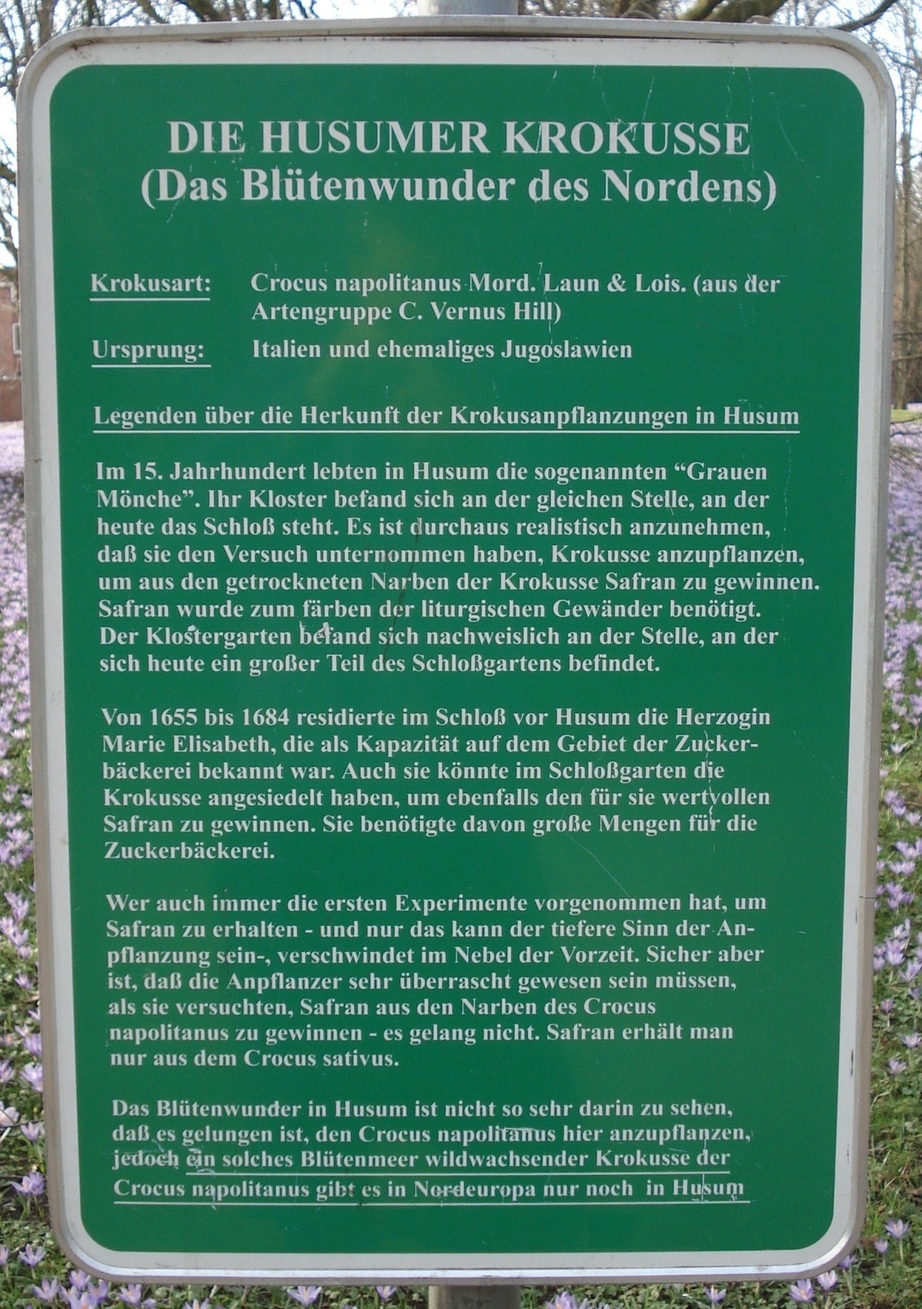 Husumer_Krokusbluete_-_Schild